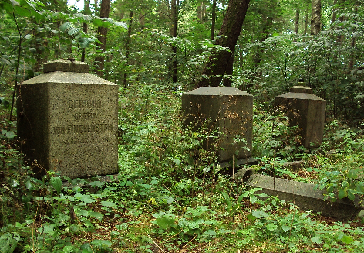 Cmentarz rodowy szymbarskiej linii von Finckensteinów. Spoczywa na nim czterech w linii prostej Konradów Finck von Finckenstein oraz Getruda i Agnes - matka i córka Finckensteinów